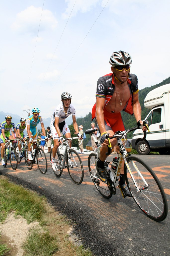 Армстронг, Шлек, Контадор и Бассо взбираются в гору на 9-м этапе Тур де Франс 2010